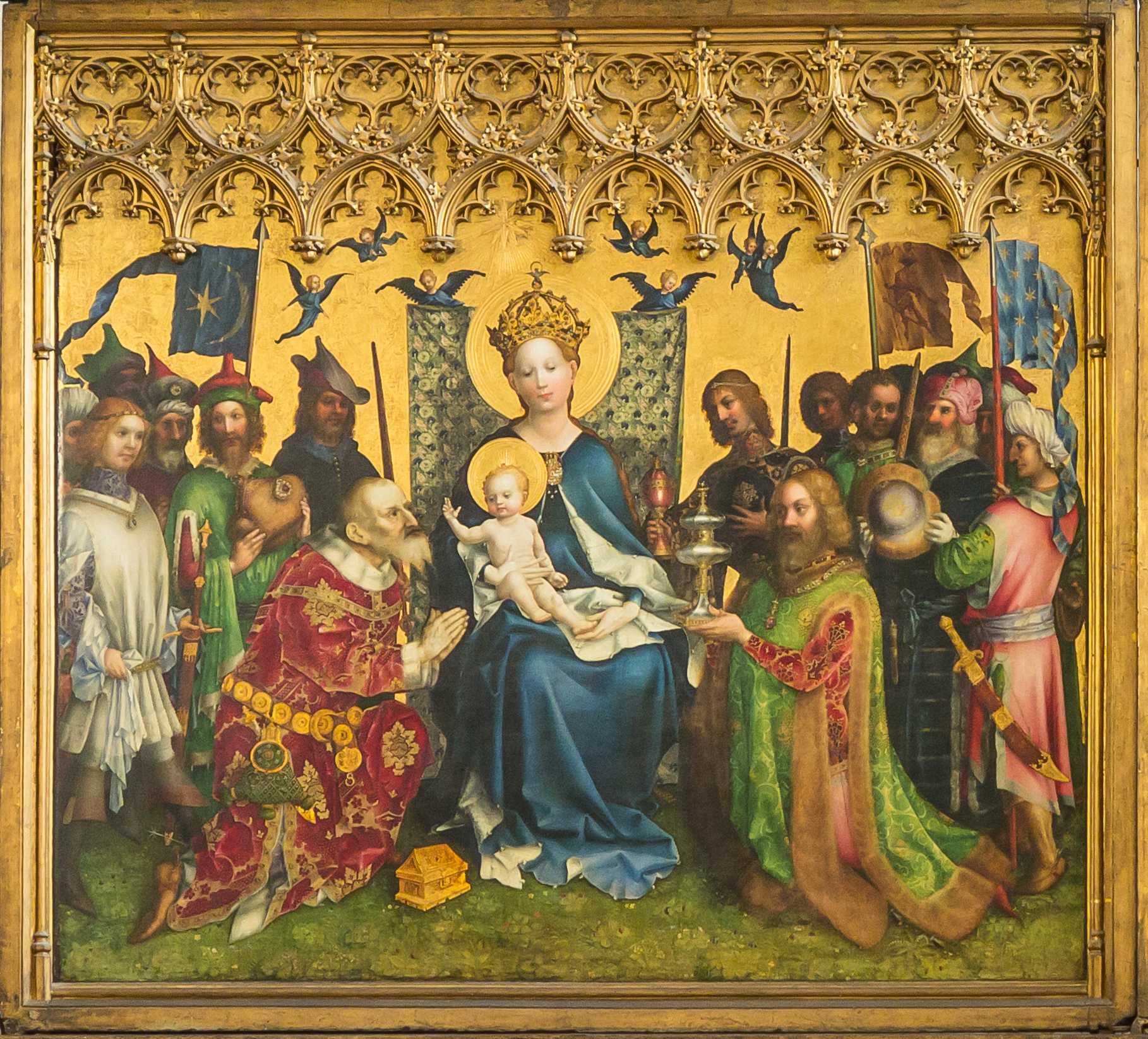 Vorstellung der Sonderbriefmarke „Weihnachten 2017“. Das Postwertzeichen zeigt einen Ausschnitt des von Stefan Lochner gestalteten Altars der Stadtpatrone in der Marienkapelle des Kölner Doms.